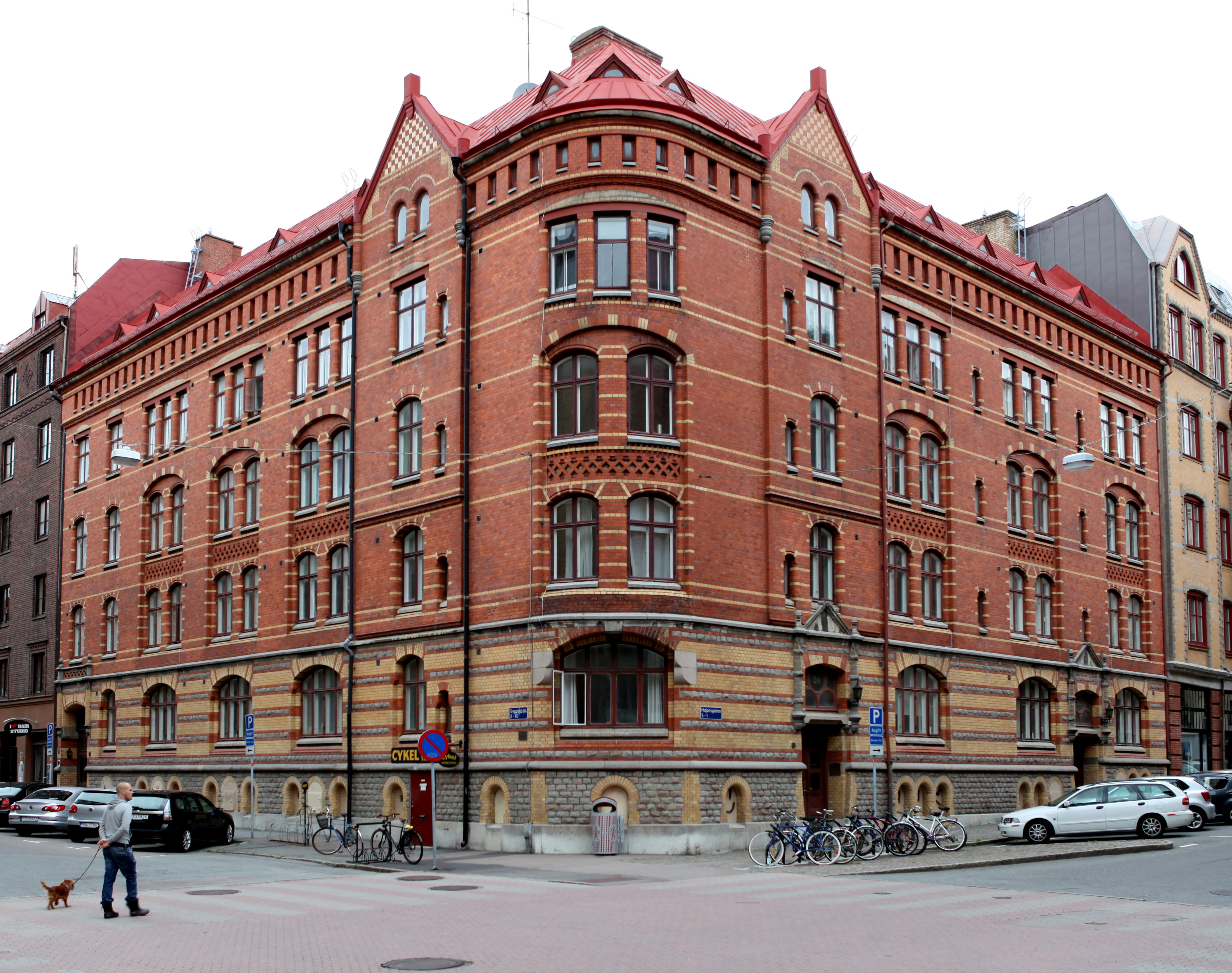 Fasaden, fotograferad från hörnet Sveagatan, Majorsgatan. Uppfört för "SJ:s Änke- och pupillkassa” och 1899. Arktiekt Hans Hedlund